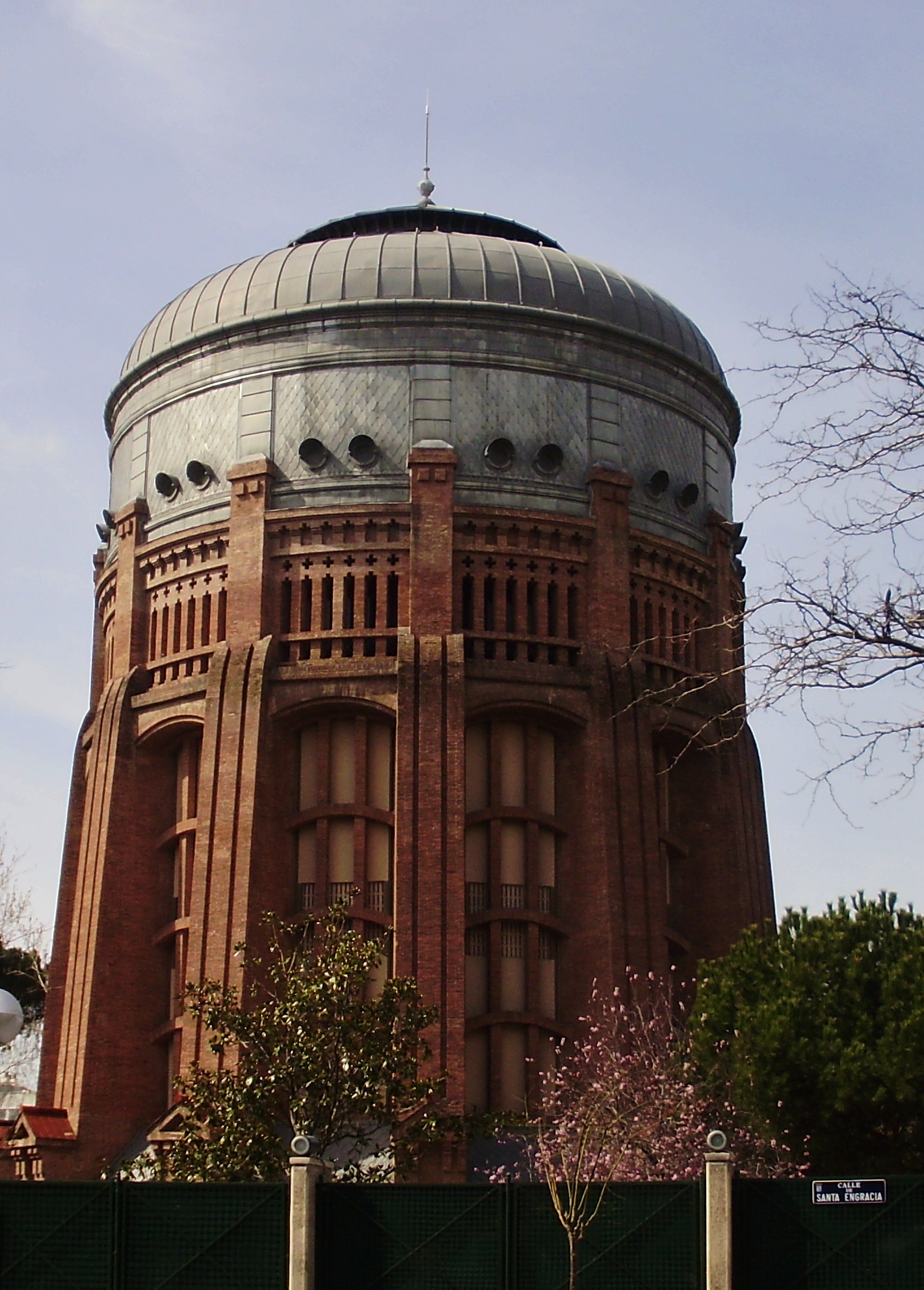 Depósito elevado del Canal de Isabel II fotografiado desde la calle Santa Engracia, distrito de Chamberí, Madrid.